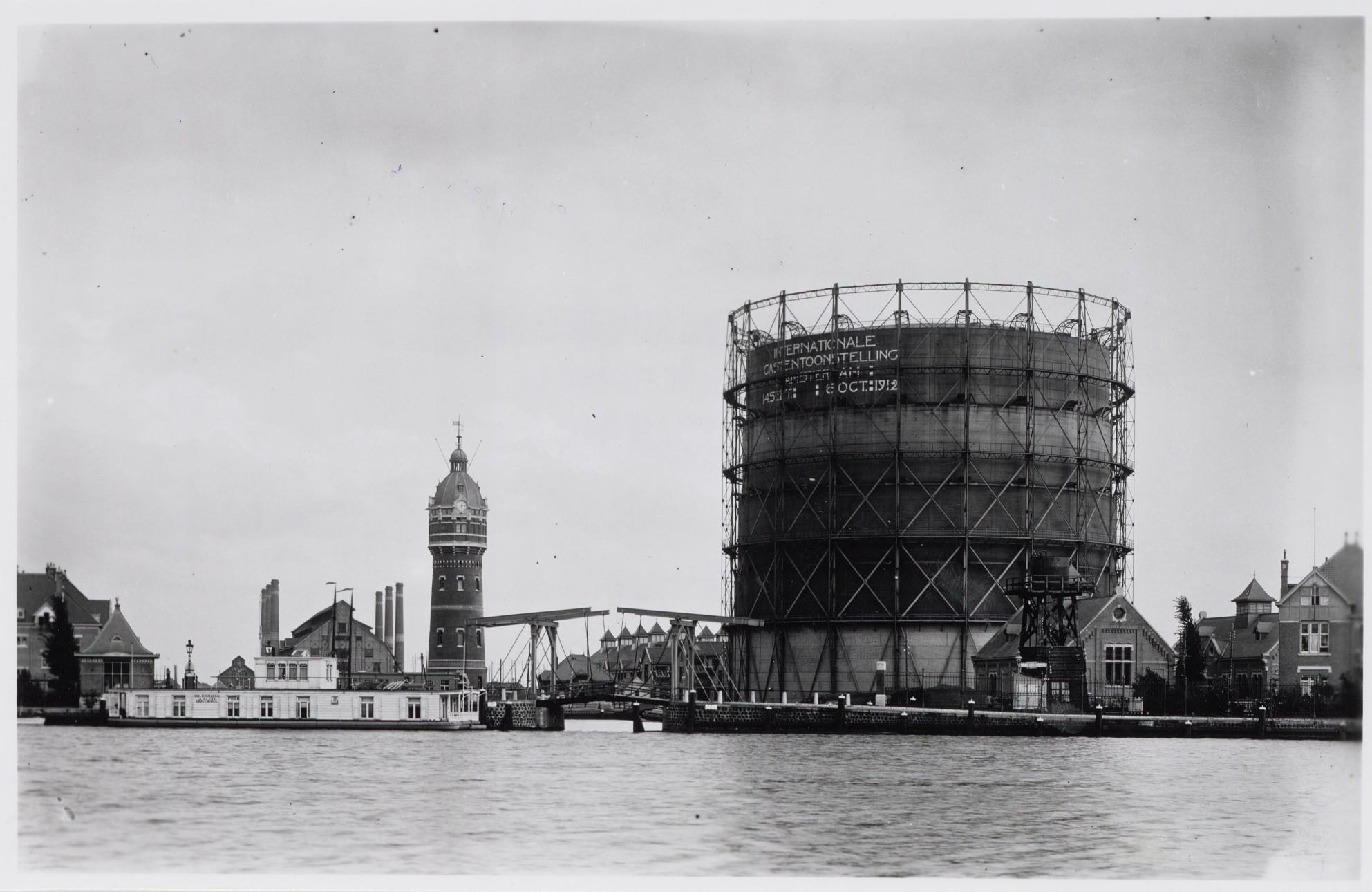 Ophaalbrug 311 en de Zuidergasfabriek met watertoren, bij de Omval aan de Amstel, 1912